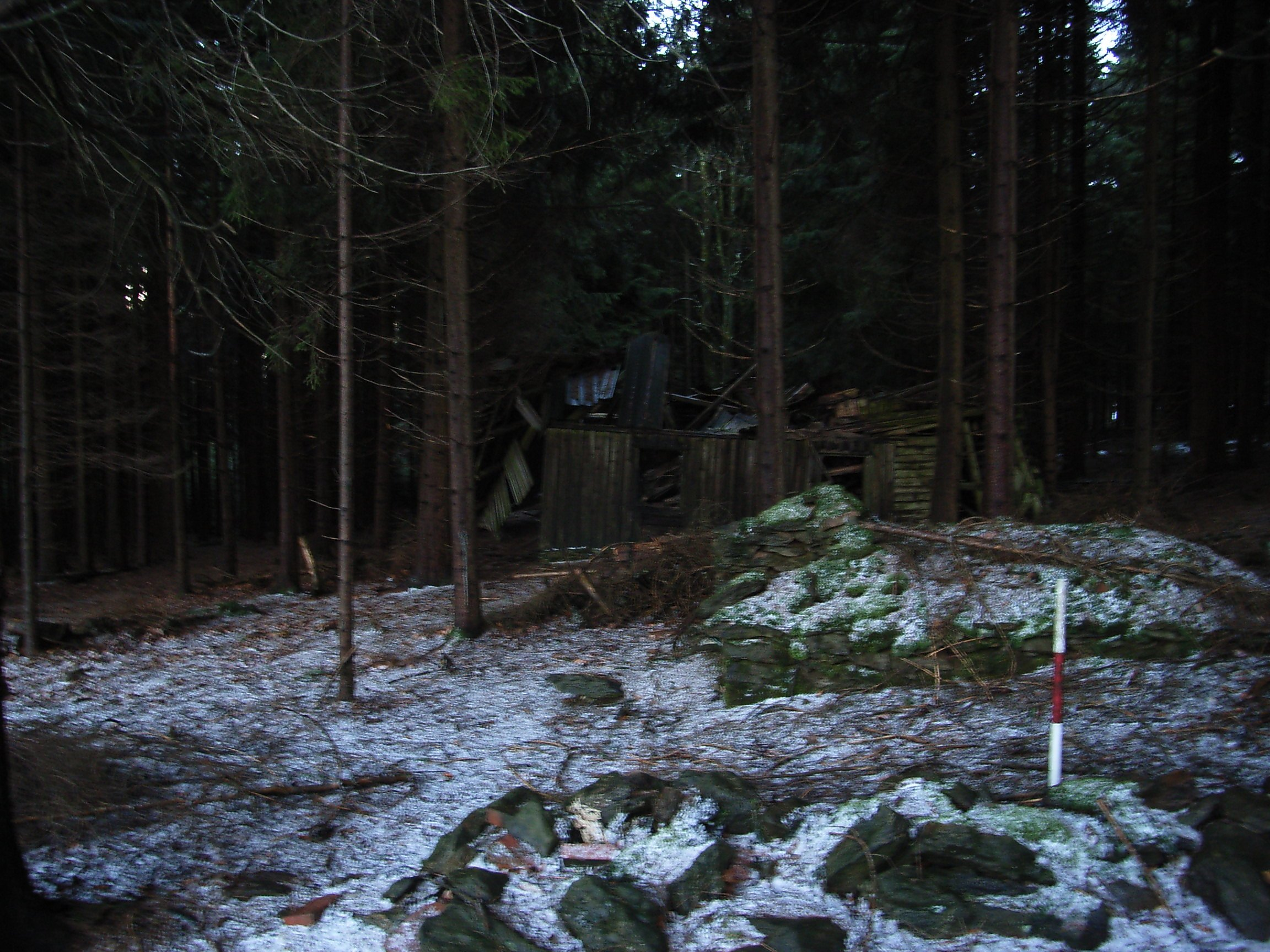 Bügellohe ehemaliges Gasthaus Florl